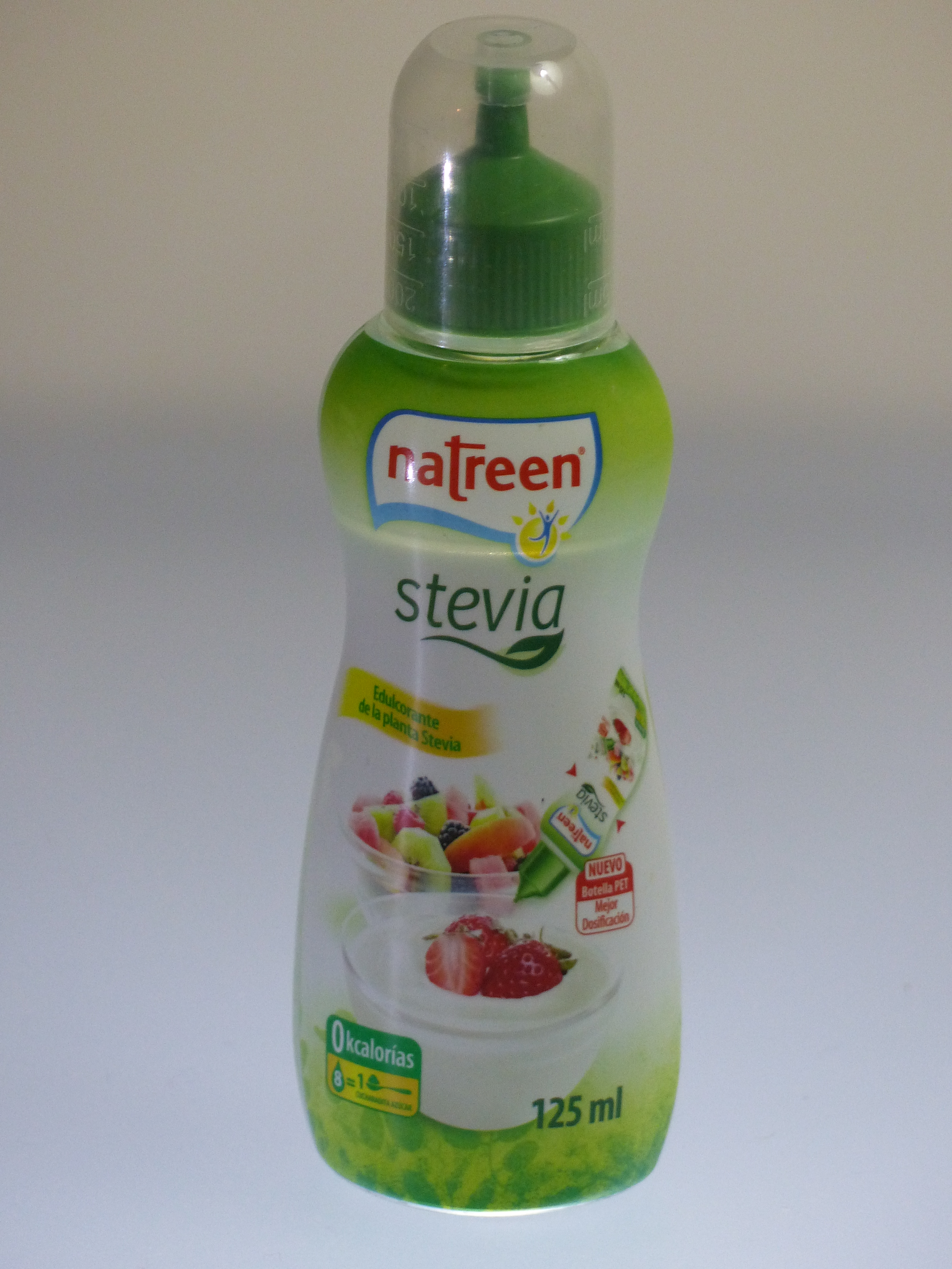 Bote natreen de stevia